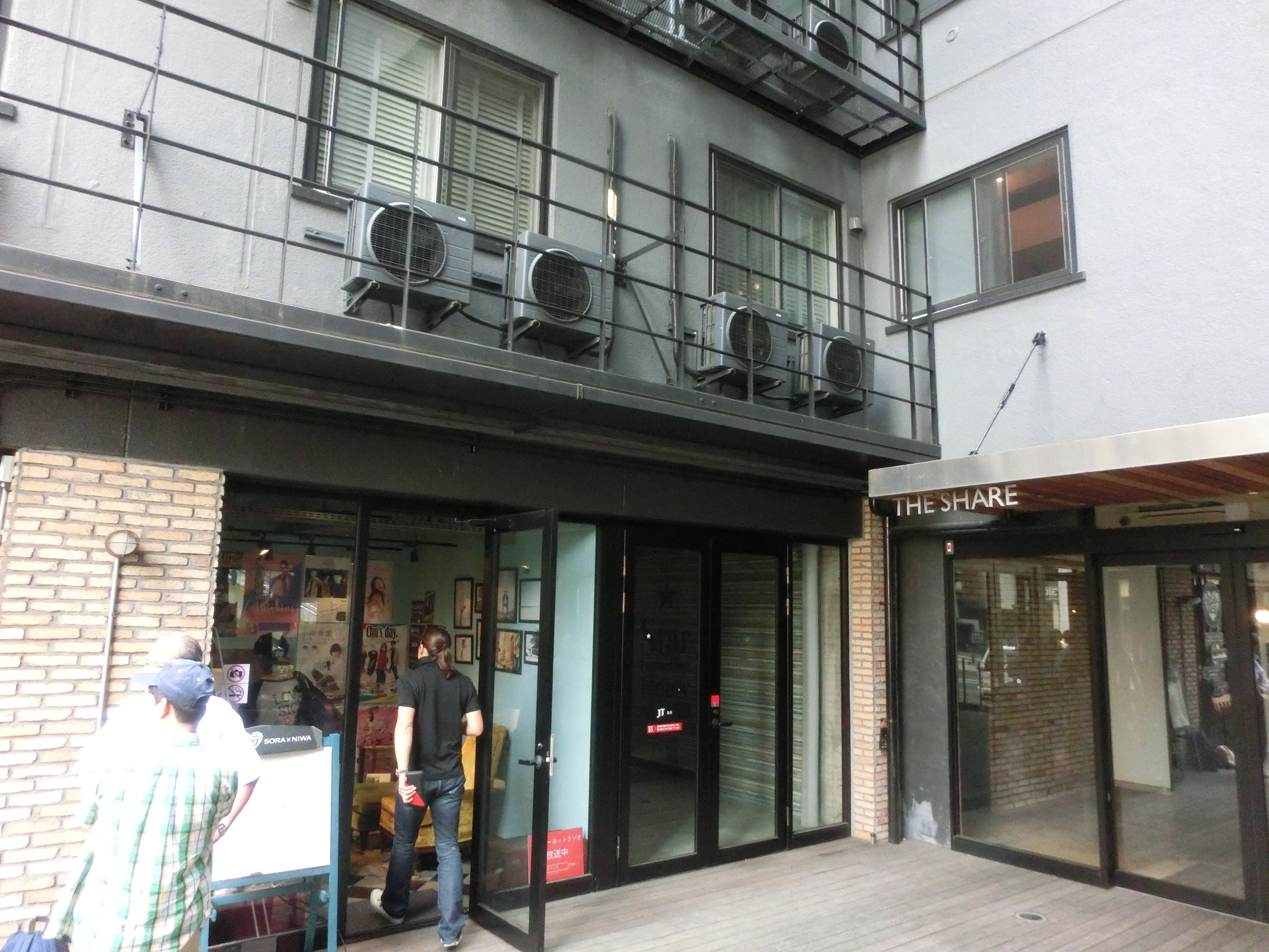 ソラトニワ原宿スタジオ